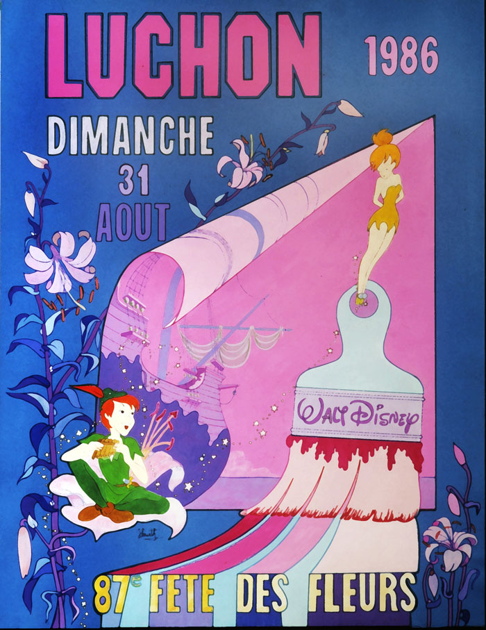 Peter Pan - Affiche de la 87ème fête des fleurs - Luchon (1986)